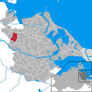 Behrenhoff, Landkreis Ostvorpommern, Mecklenburg-Vorpommern